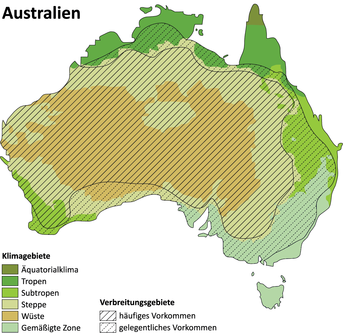 Verbreitungsgebiet der Wellensittiche in Australien.